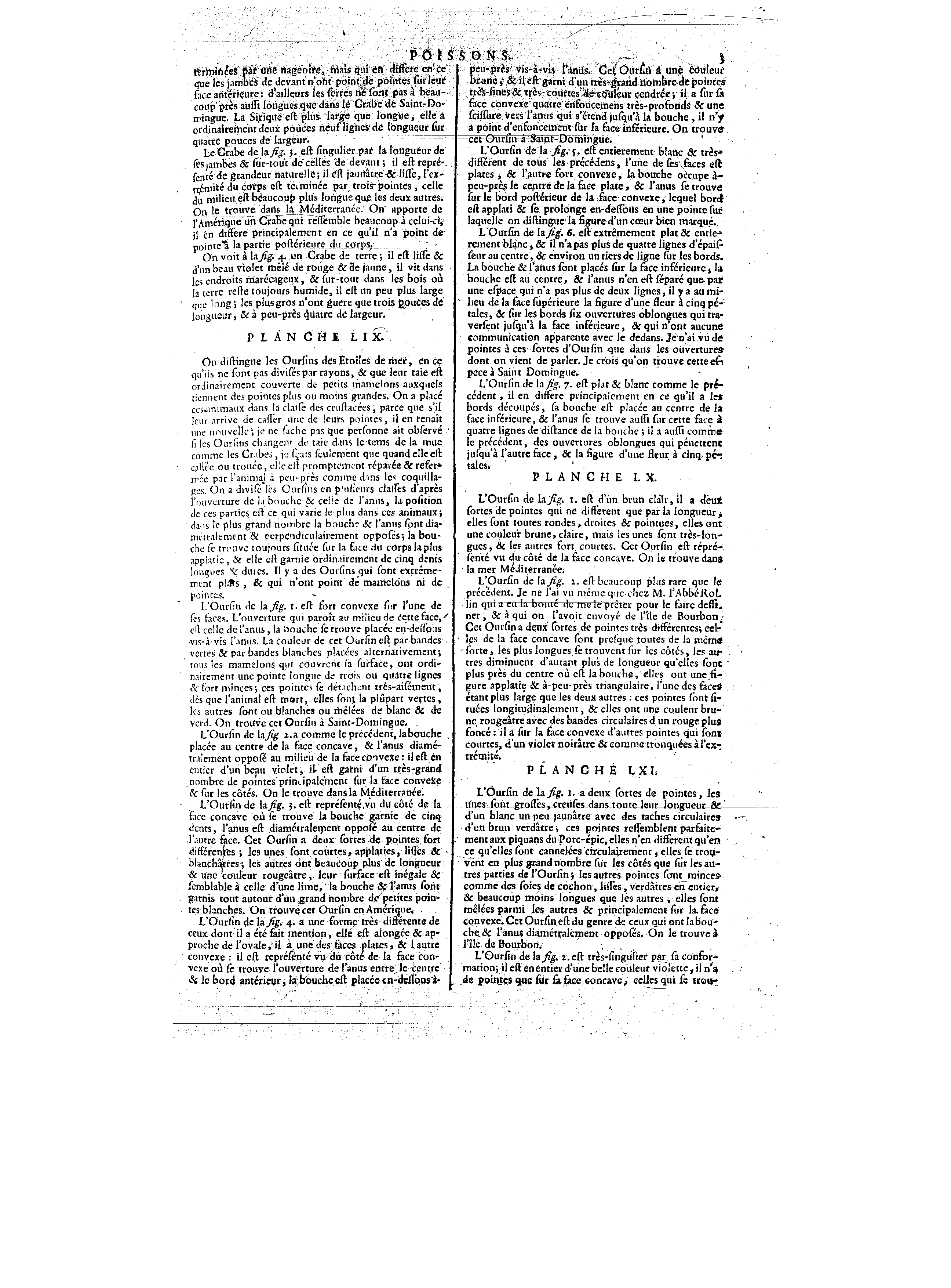 Planches de l'Encyclopédie de Diderot et d'Alembert, volume 5